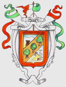 Escudo del municipio de Arteaga, Coahuila